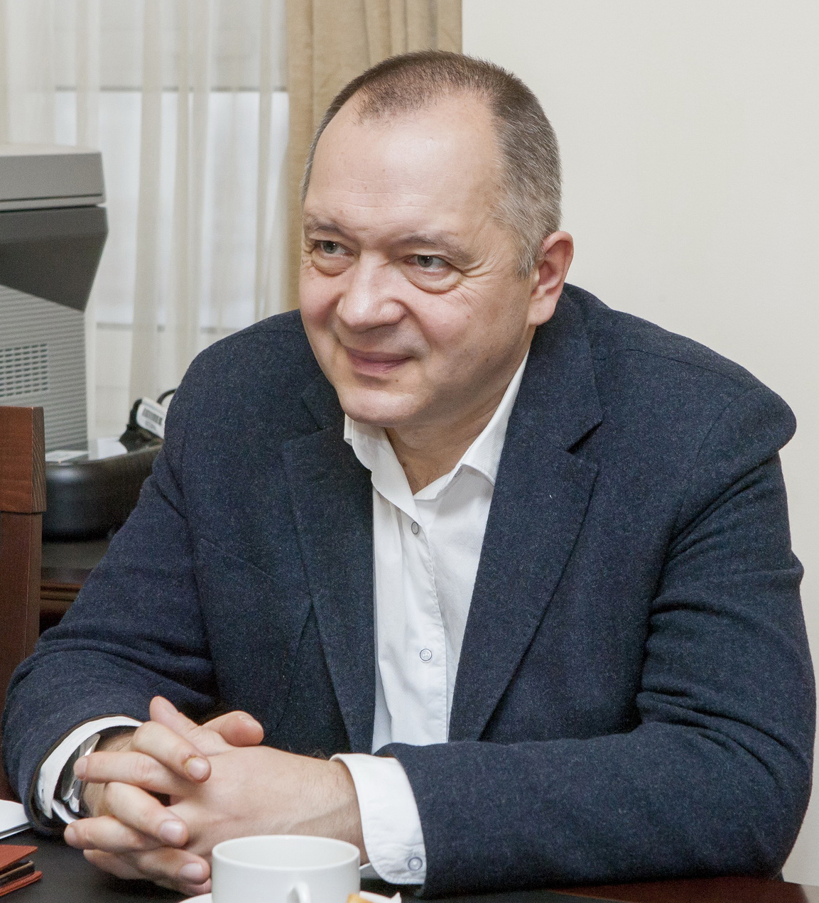 Доктор исторических наук Серов Д.О.